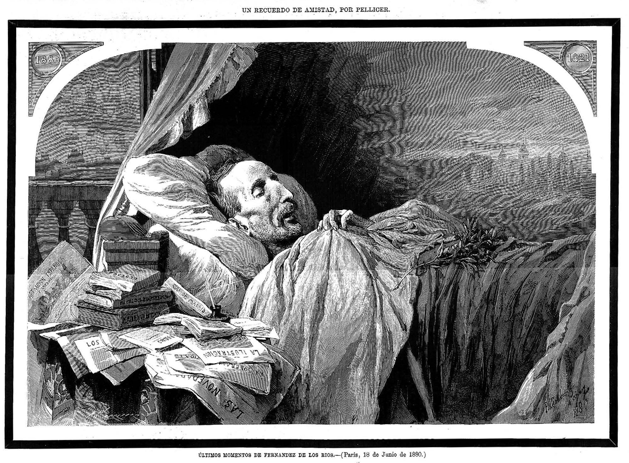 Un recuerdo de amistad. Últimos momentos de Fernández de los Ríos (París, 18 de junio de 1880), en La Ilustración Española y Americana.